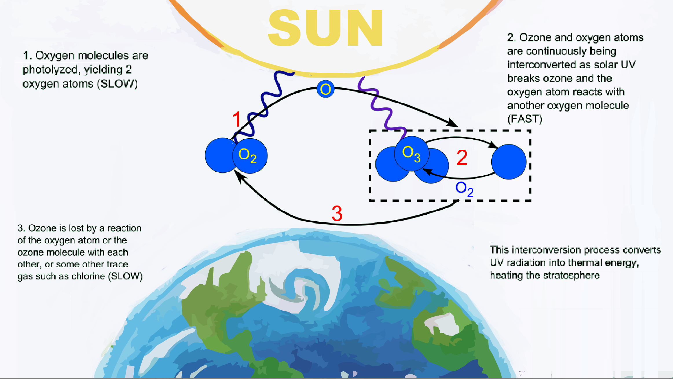 The ozone–oxygen cycle is the process by which ozone is continually regenerated in Earth's stratosphere, converting ultraviolet radiation (UV) into heat